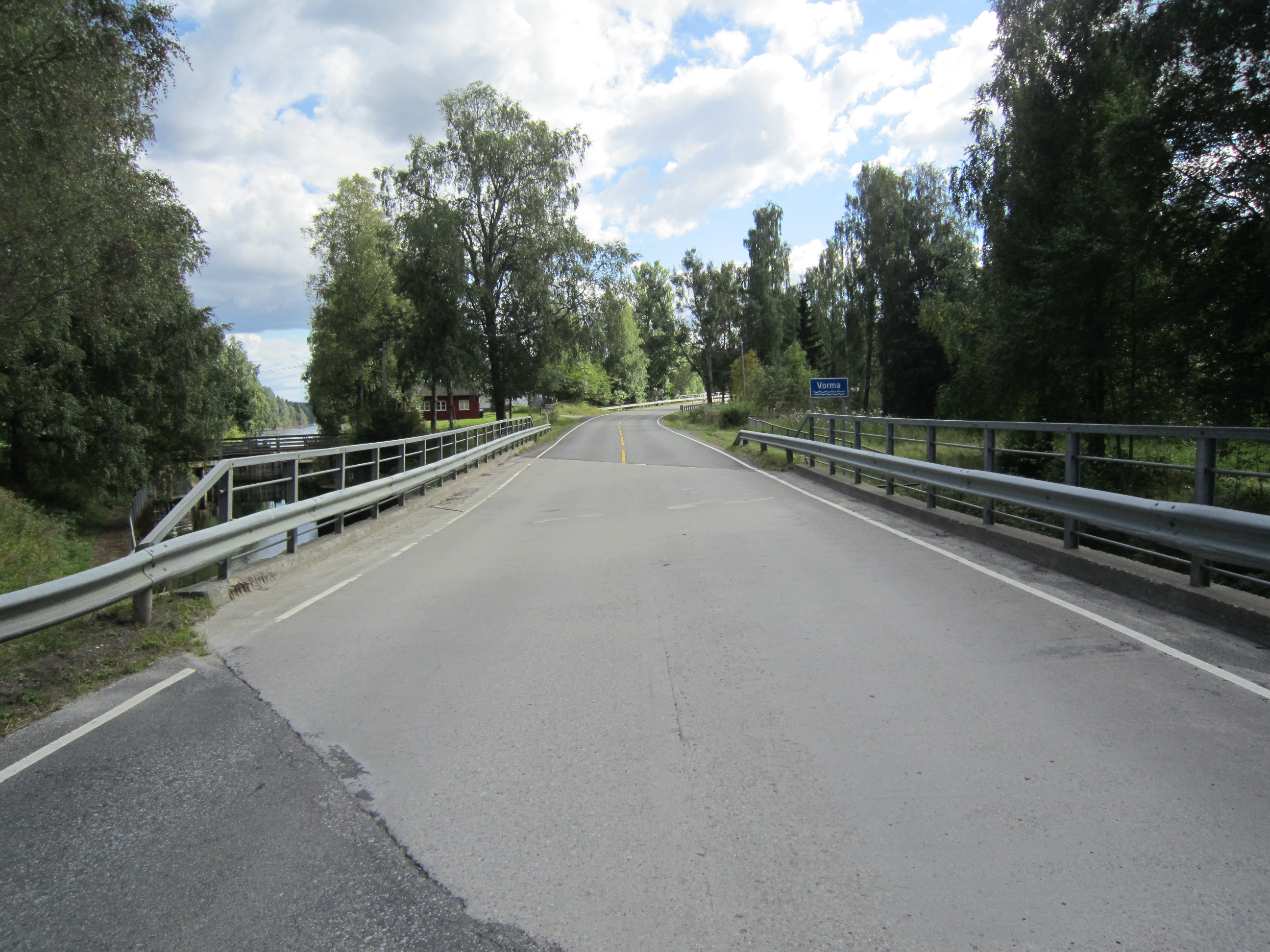 Fylkesvei 179 krysser Vorma ved Svanfoss.